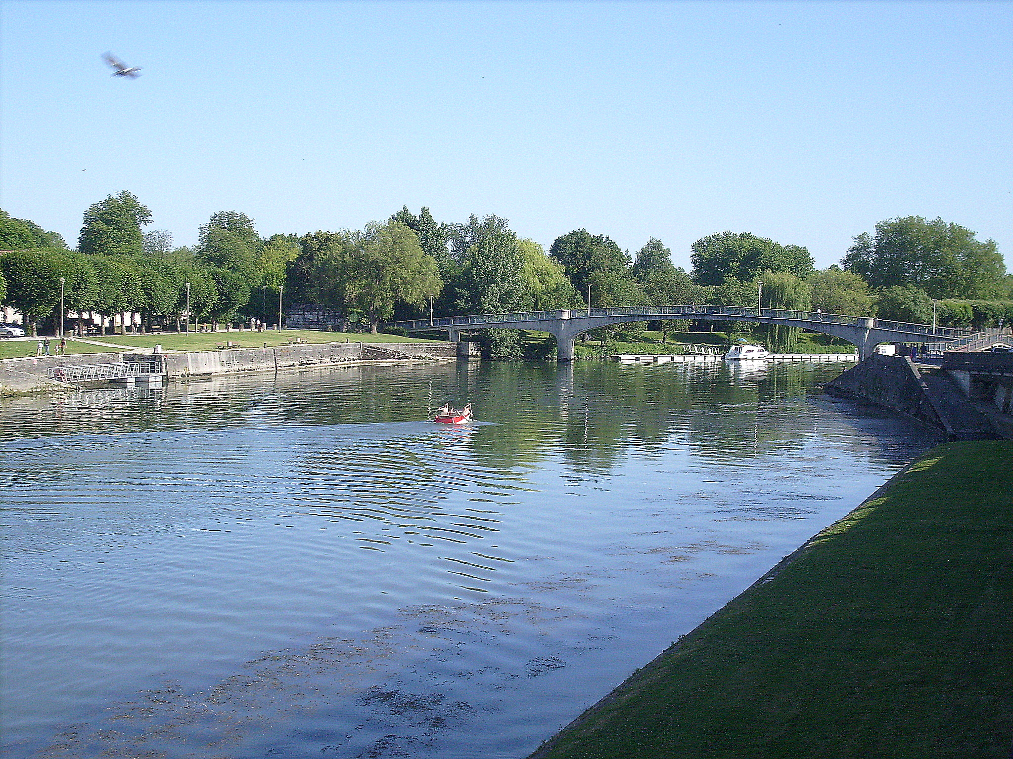 Saintes : La passerelle du jardin public enjambe la Charente